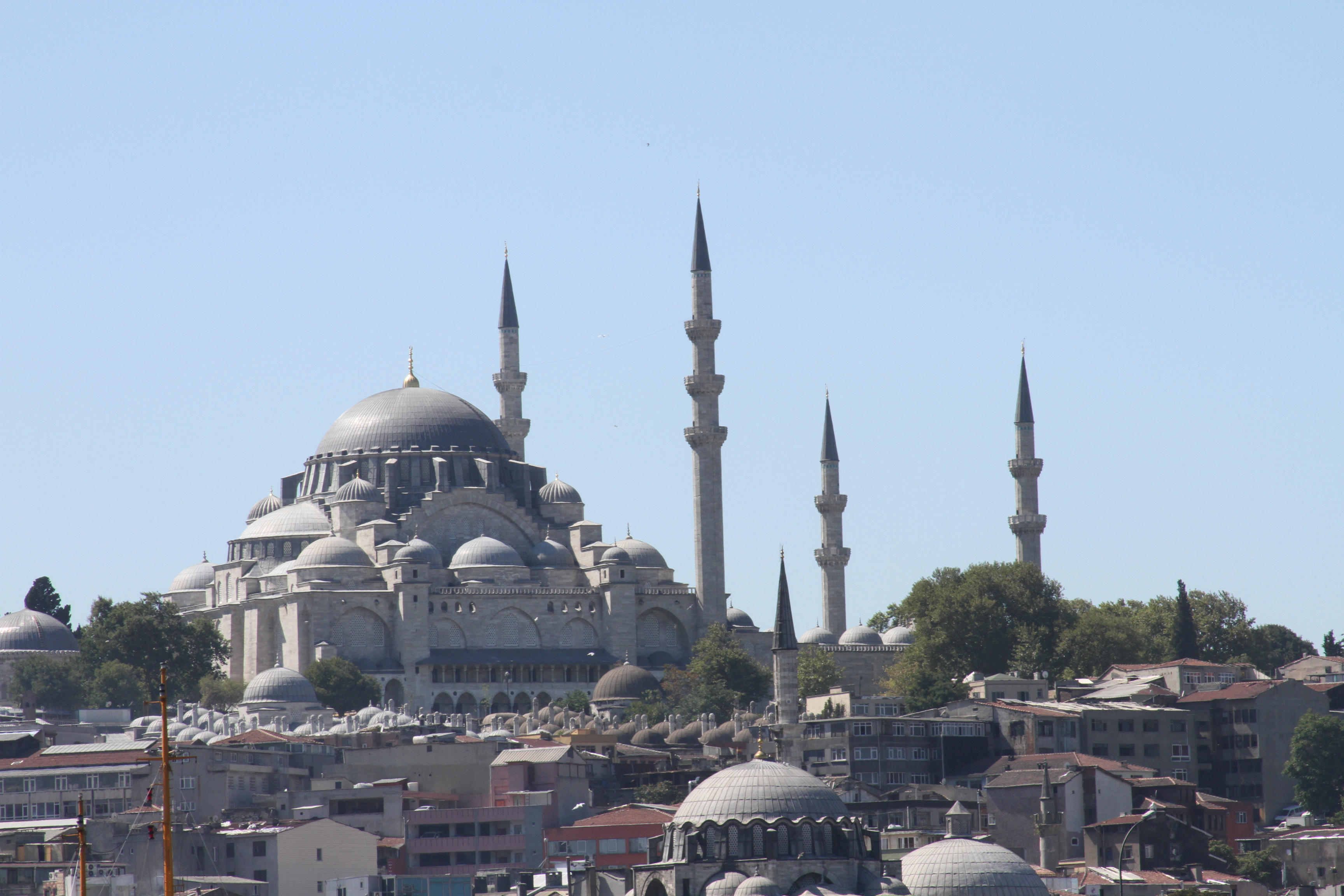 Vista da Mesquita Süleymaniye a partir do Bósforo